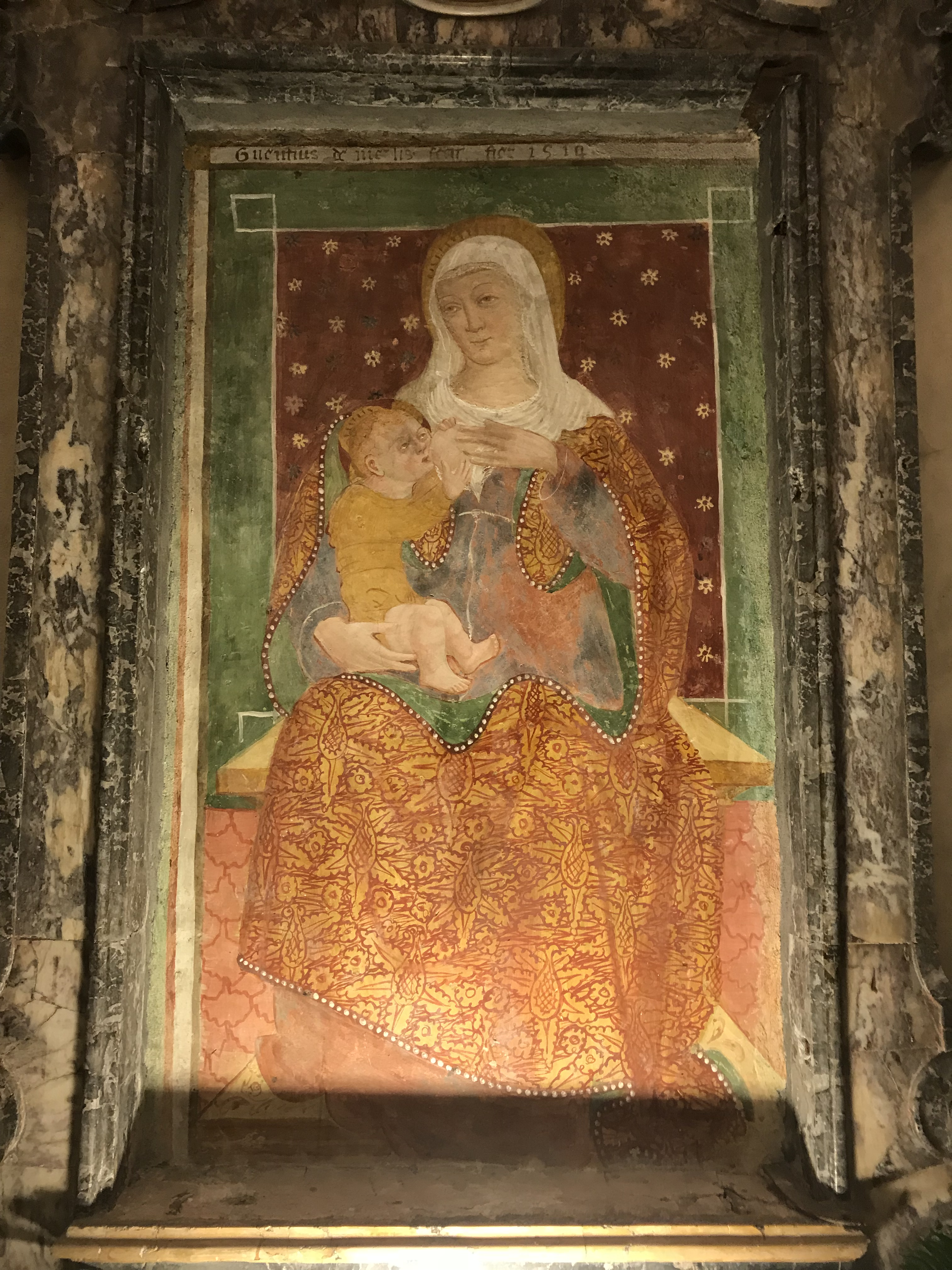 Madonna del Campo, frazione di Mortara: Santuario di Santa Maria del Campo, interno, abside, affresco della Madonna del latte, opera di Tommasino da Mortara eseguita nel 1514.